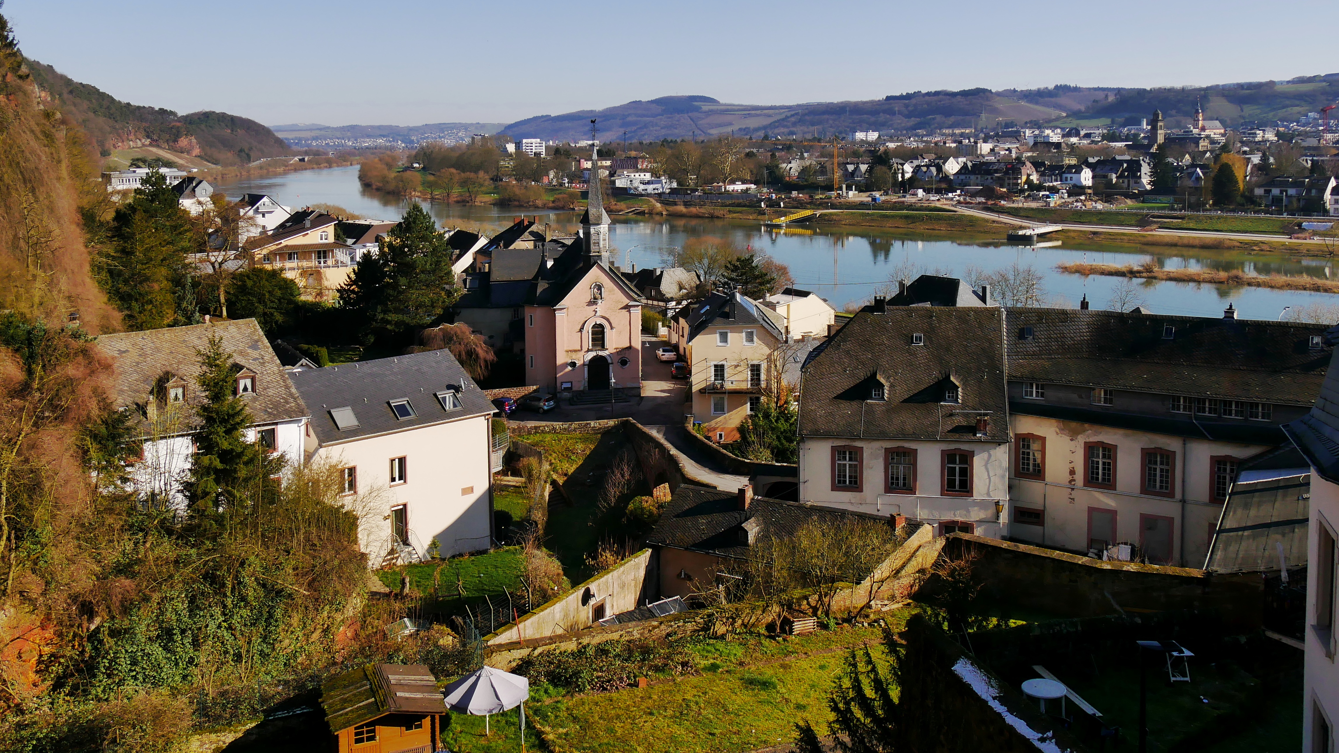 Trier-Pallien und die Mosel (Blickrichtung Moselabwärts) - Am gegenüberliegenden Ufer Trier-Nord mit den Kirchtürmen von St. Martin (Dunkelgrau) und St. Paulin (Gelb und Rosa)